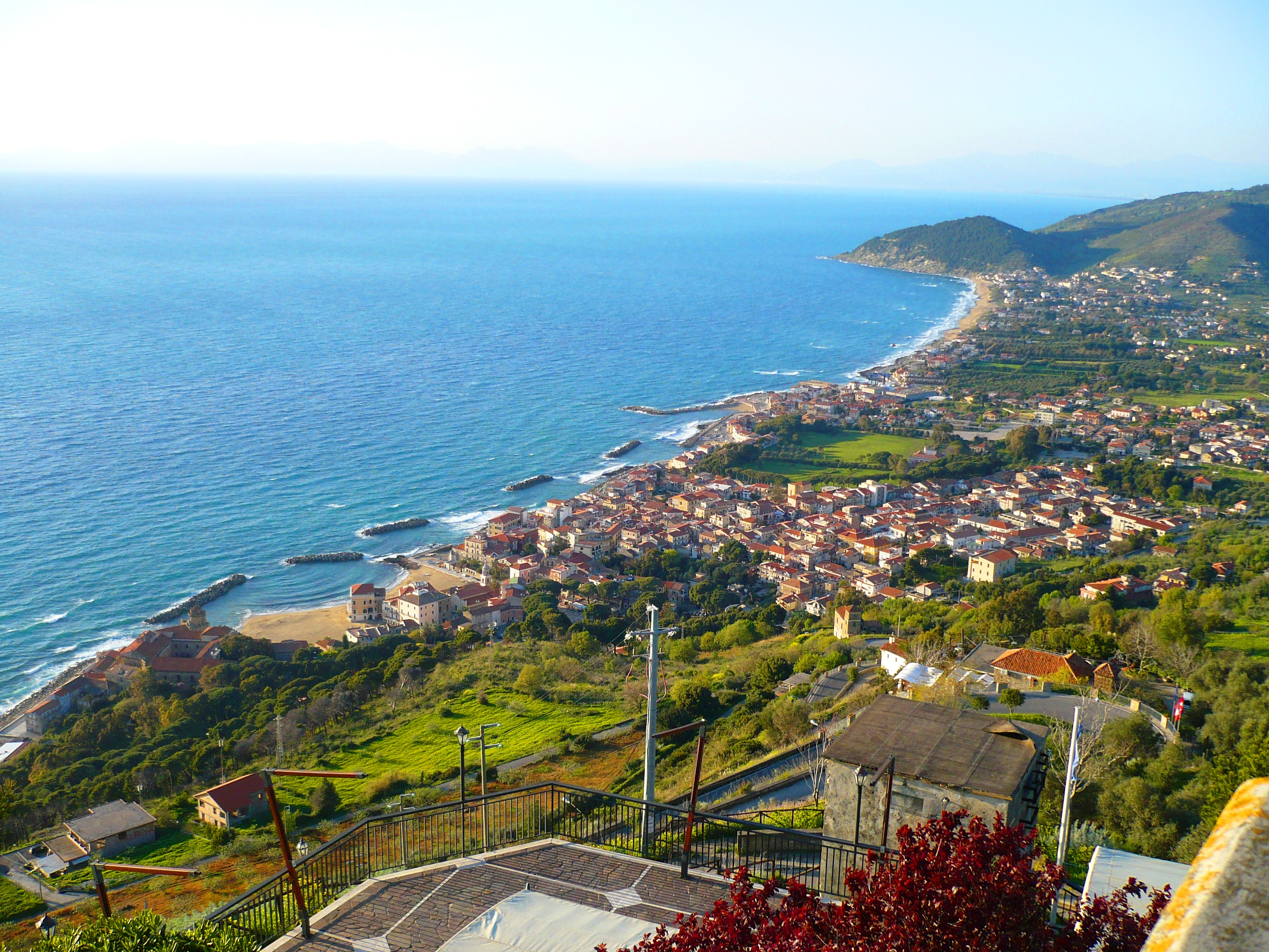 Il panorama di S.Maria di Castellabate